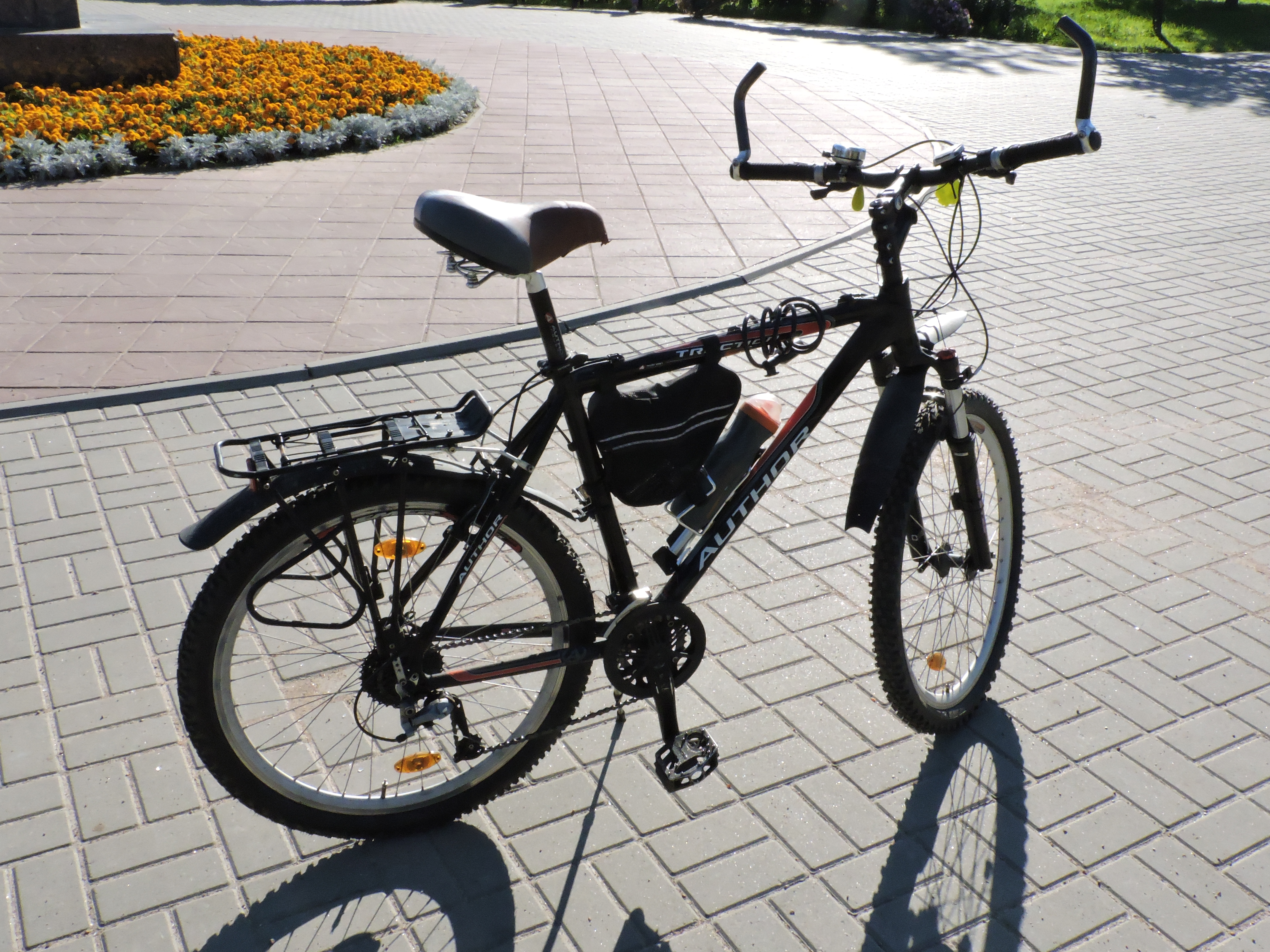 Author Traction